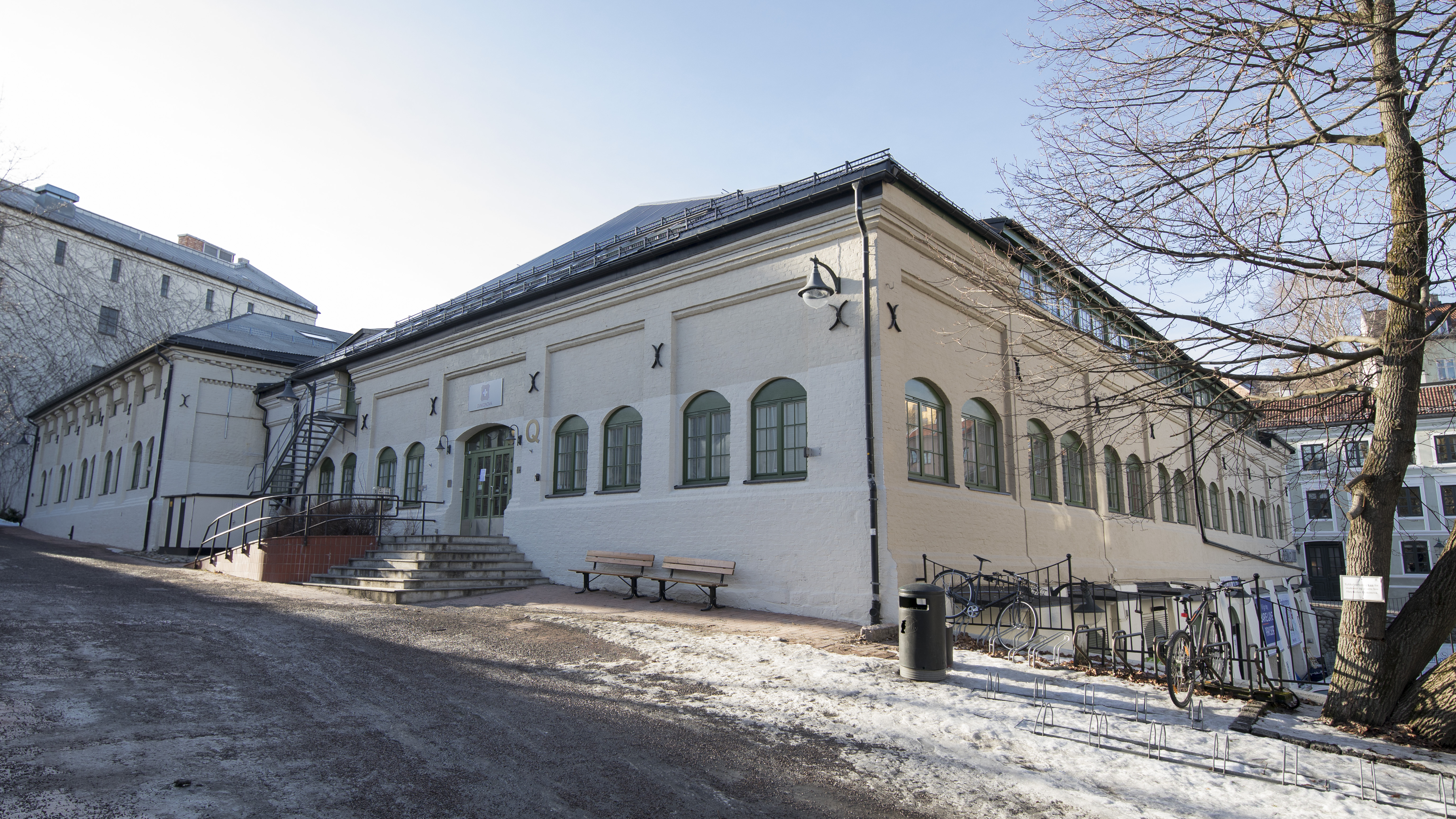 Høyskolen Diakonova i Oslo